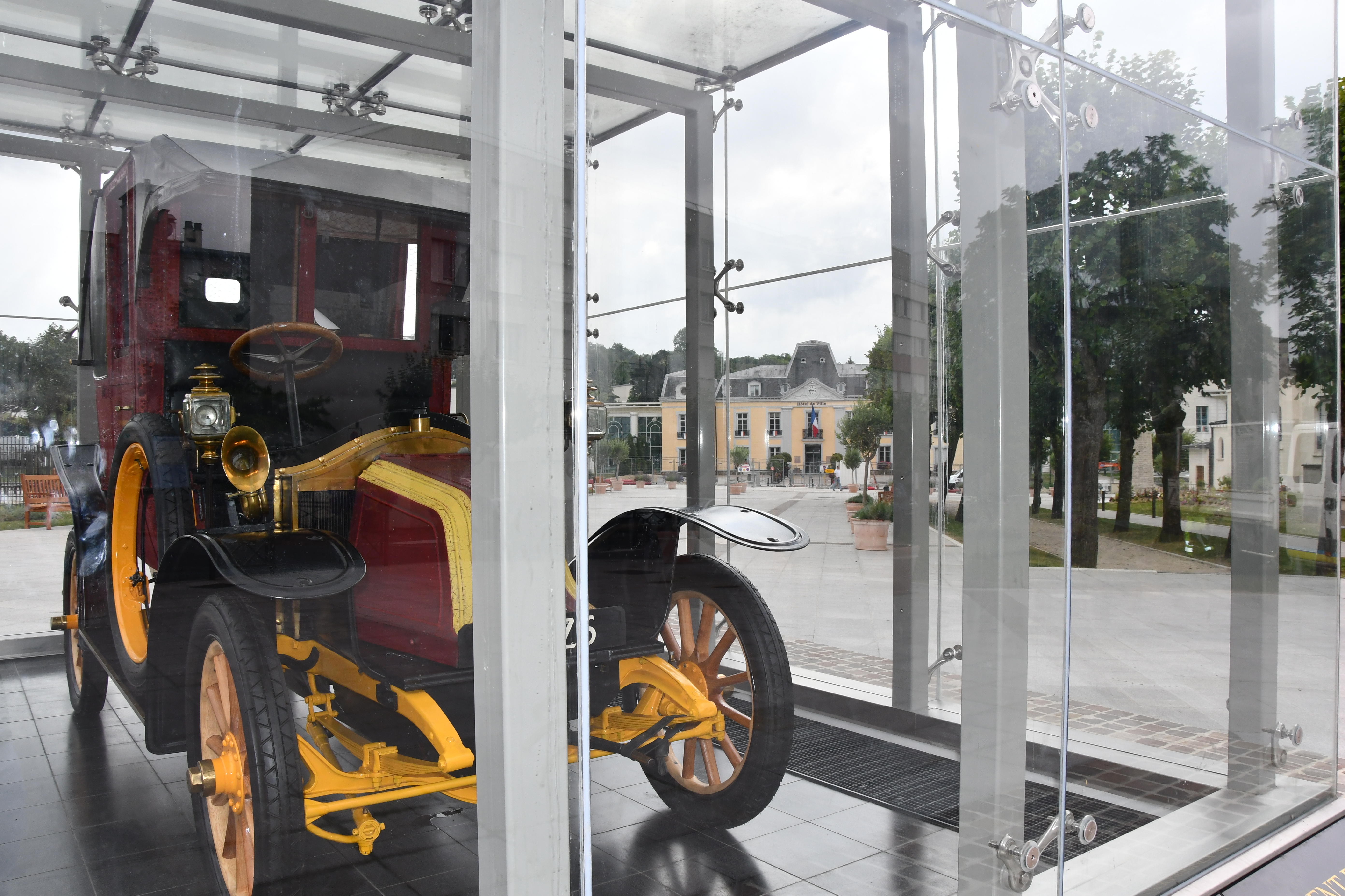 Taxi de la Marne sur la place Foch face à l'Hôtel de ville de Gagny